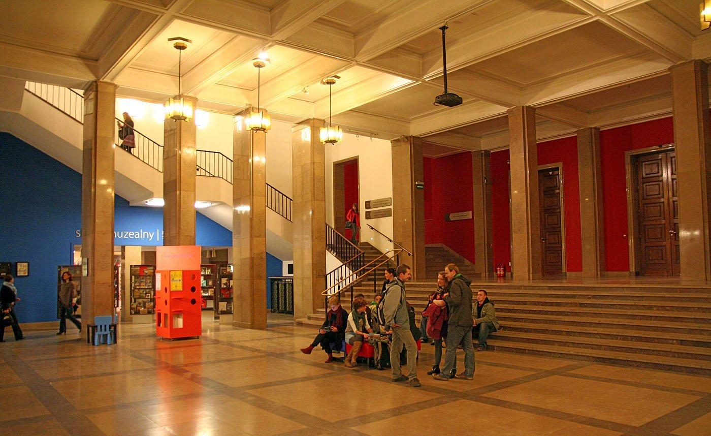 Hall główny na parterze